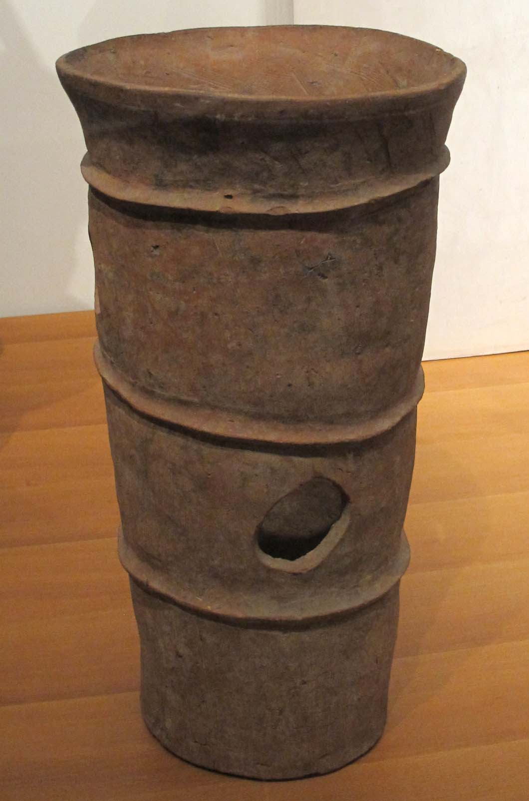 Kofun, haniwa cilindrico, IV-V sec